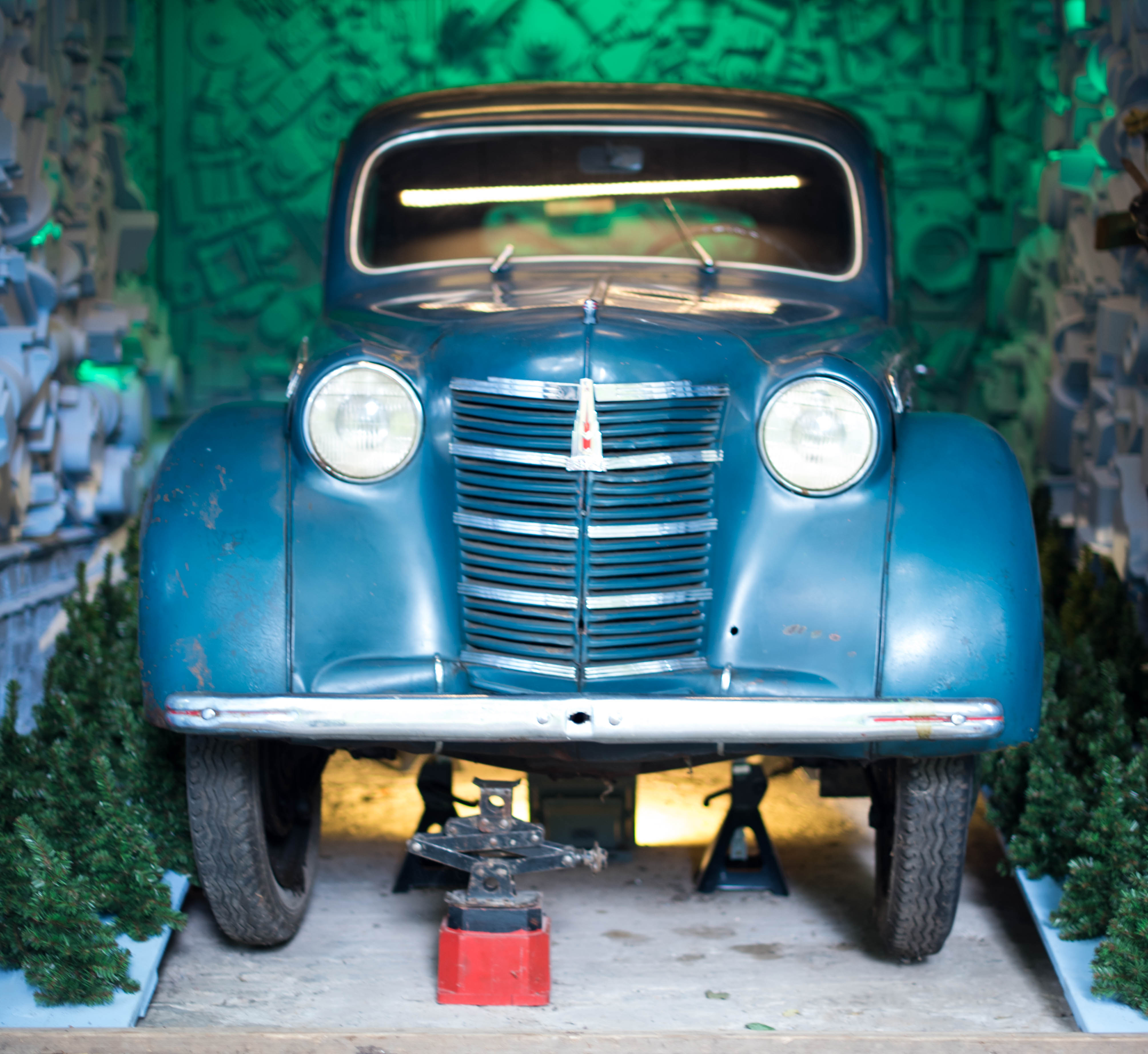 Автомобиль М.М. Пришвина в Доме-музее Пришвина (Москва и Московская область, Звенигород, деревня Дунино)